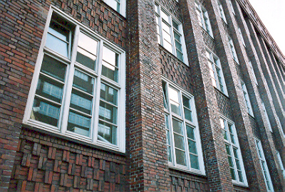 Detail der Backsteinfassade des Gebäudes der Finanzbehörde am Gänsemarkt in der Hamburger Neustadt (Architekt: Fritz Schumacher). This is a photograph of an architectural monument.